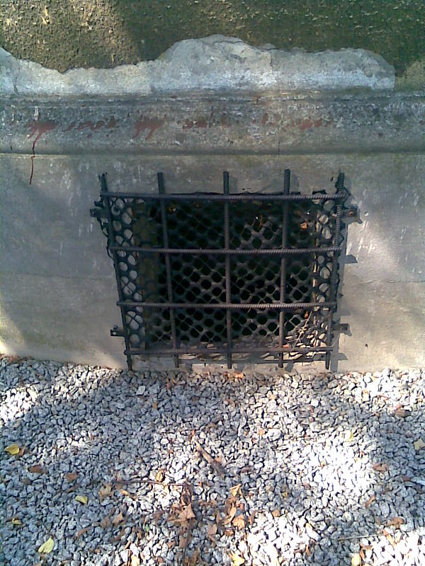 Wejście do krypty - kościół w Burzeninie